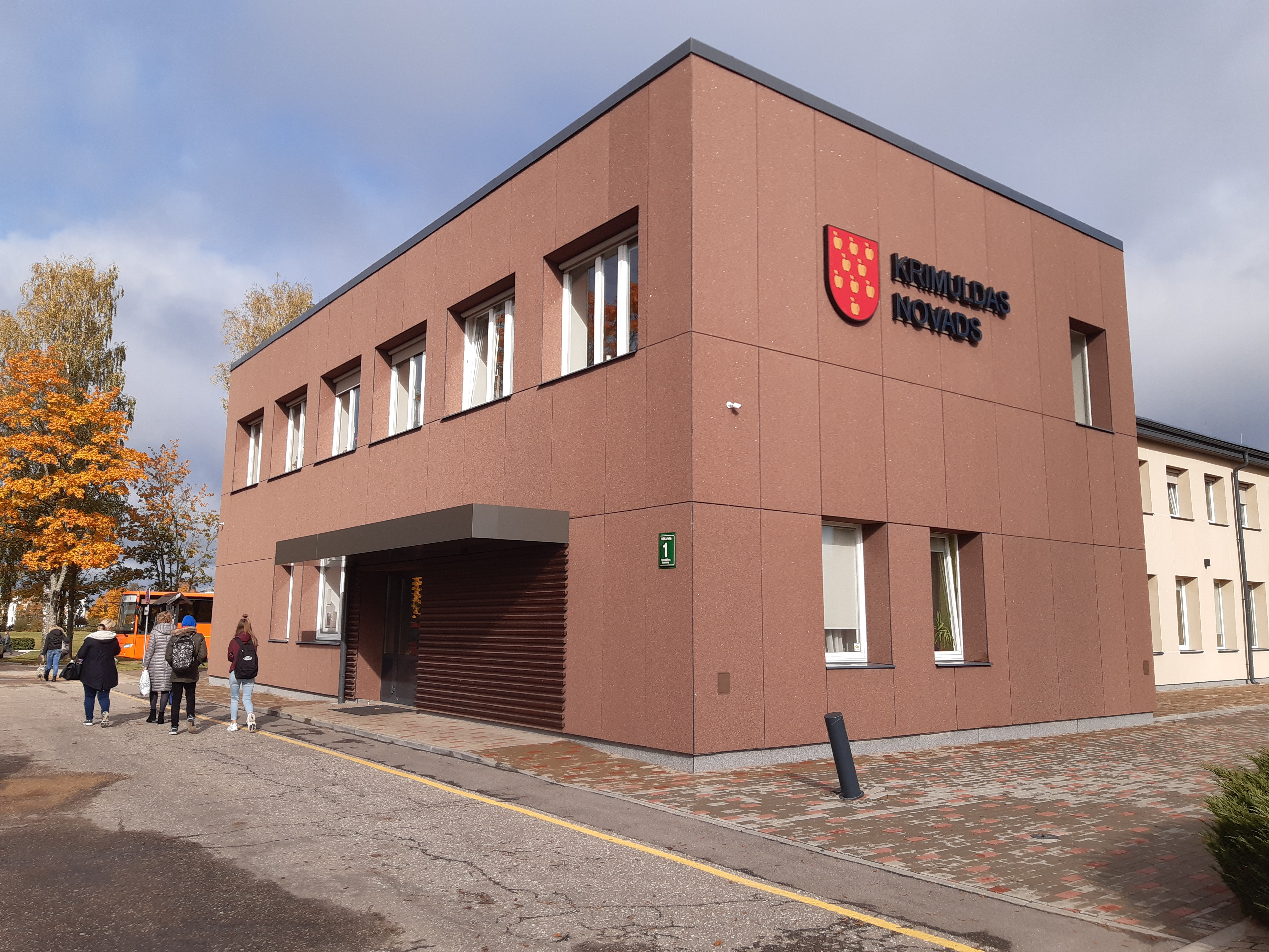 Krimuldas novada dome (Raganā).